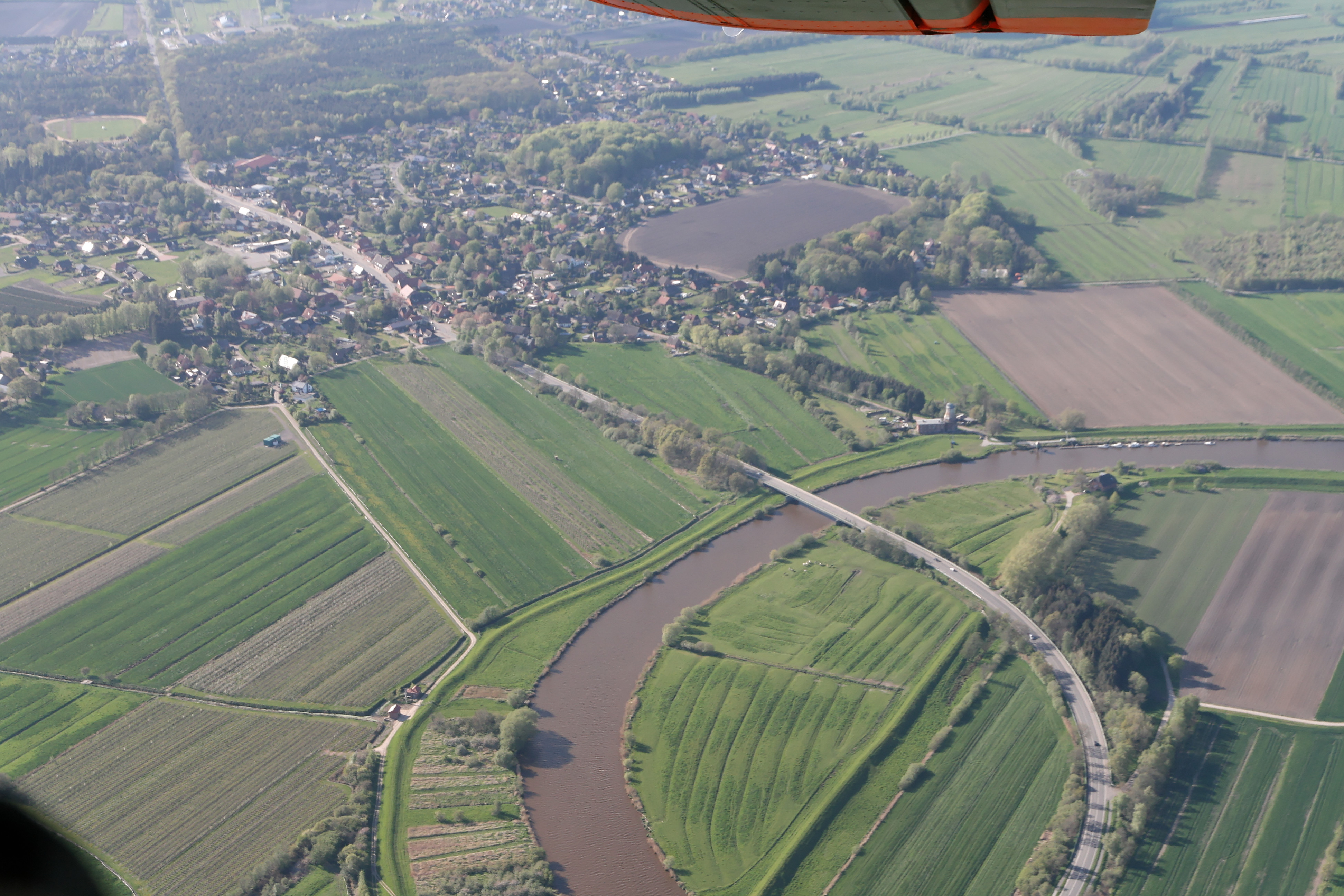 Blick op de Oost bi Heckthusen mit de Möhl un de Brügg von de Bundsstraat 73